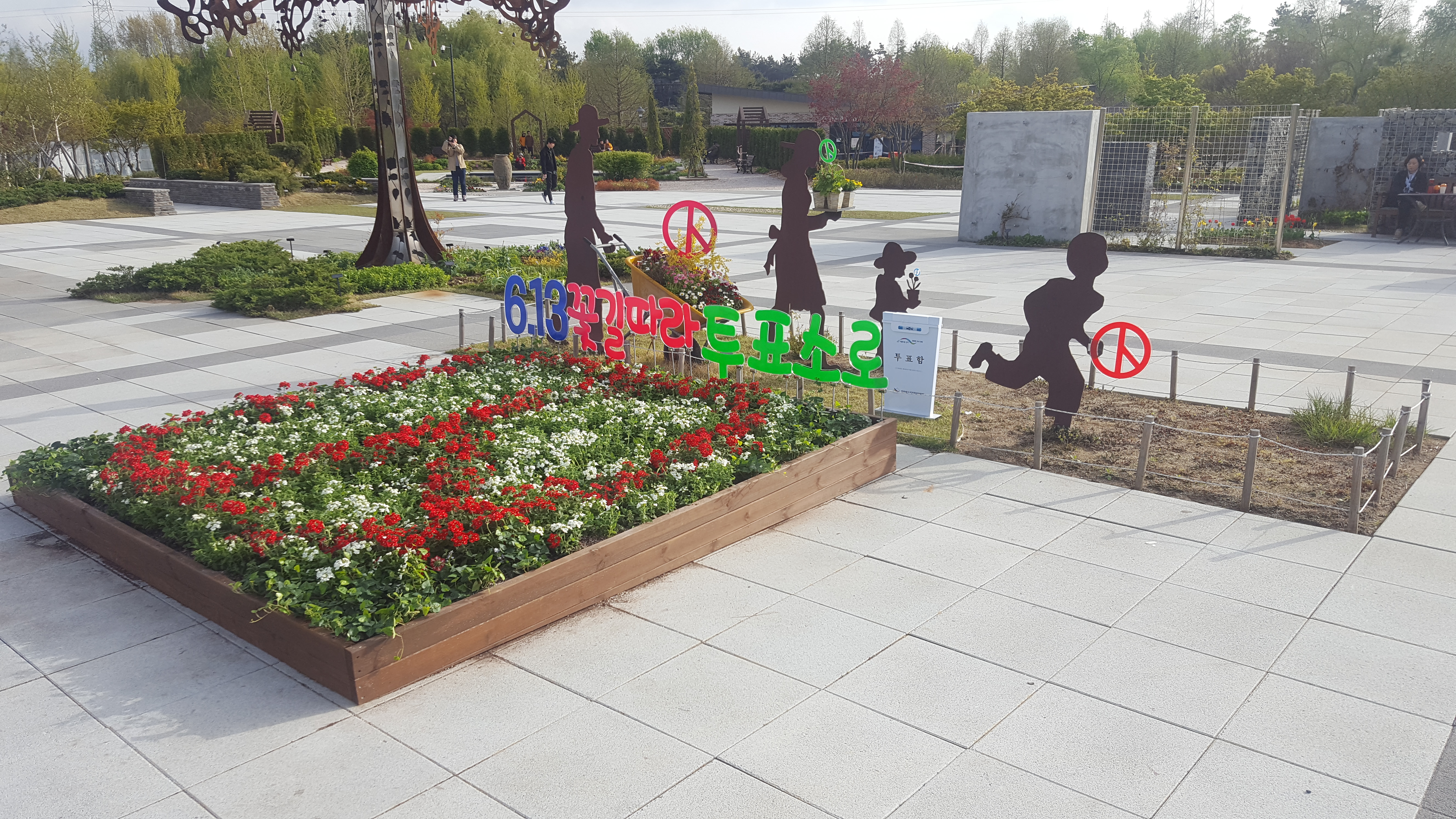 제7회 전국동시지방선거가 60일 남았다는 사실을 기념하기 위하여 2018년 4월 14~15일 2일간 전라북도 전주시 한국도로공사 수목원 랜드마크 광장에서 전라북도선거관리위원회가 주최한 "유권자 참여 꽃 심기" 행사로 30여명의 유권자와 함께 전라북도선거관리위원회 직원이 참여하여 대형 기표모양이 나타나도록 만든 대형화단과 선거조형물